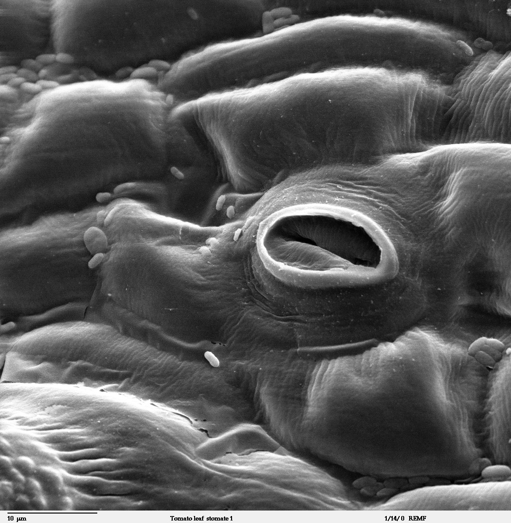 Spaltöffnung an einem dem Blatt einer Tomate.